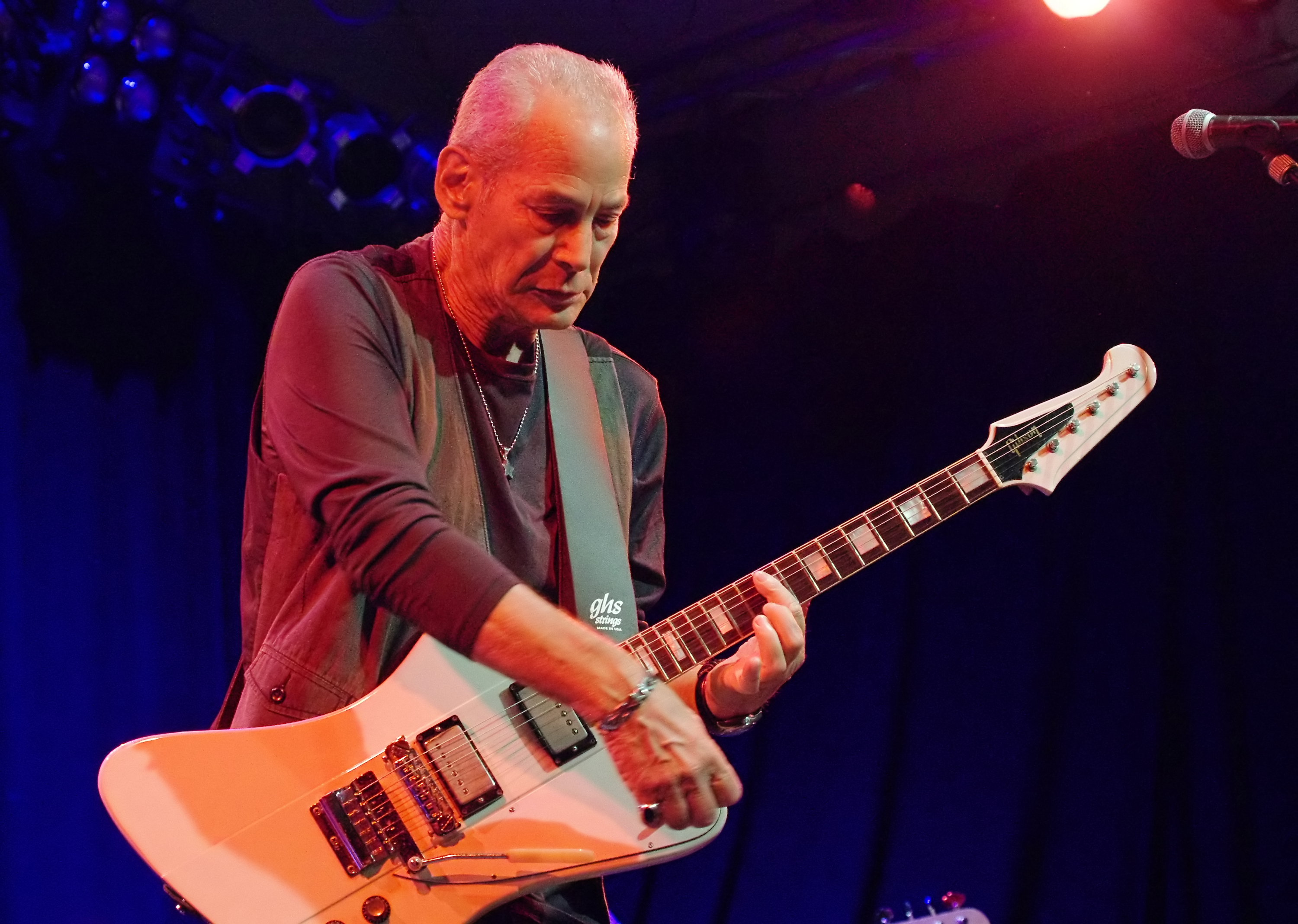 Kal David 2013 in der Lindenbrauerei Unna